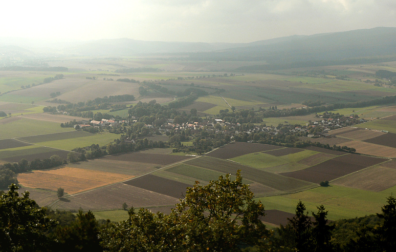 Niederurff von der Altenburg gesehen